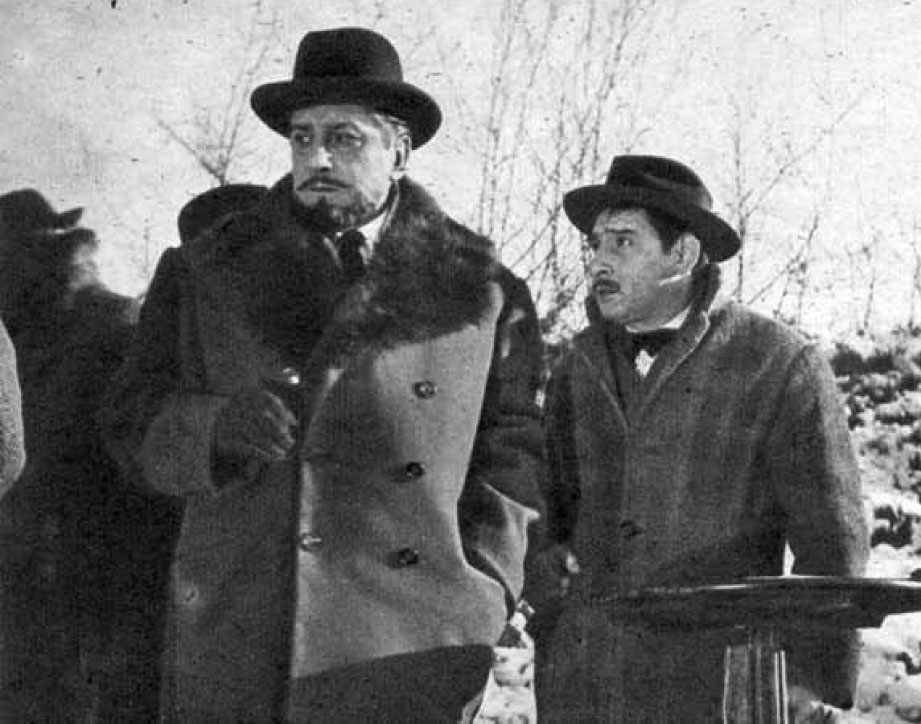 Giulio Stival e Renato Rascel ne "Il cappotto" (Lattuada, 1952).